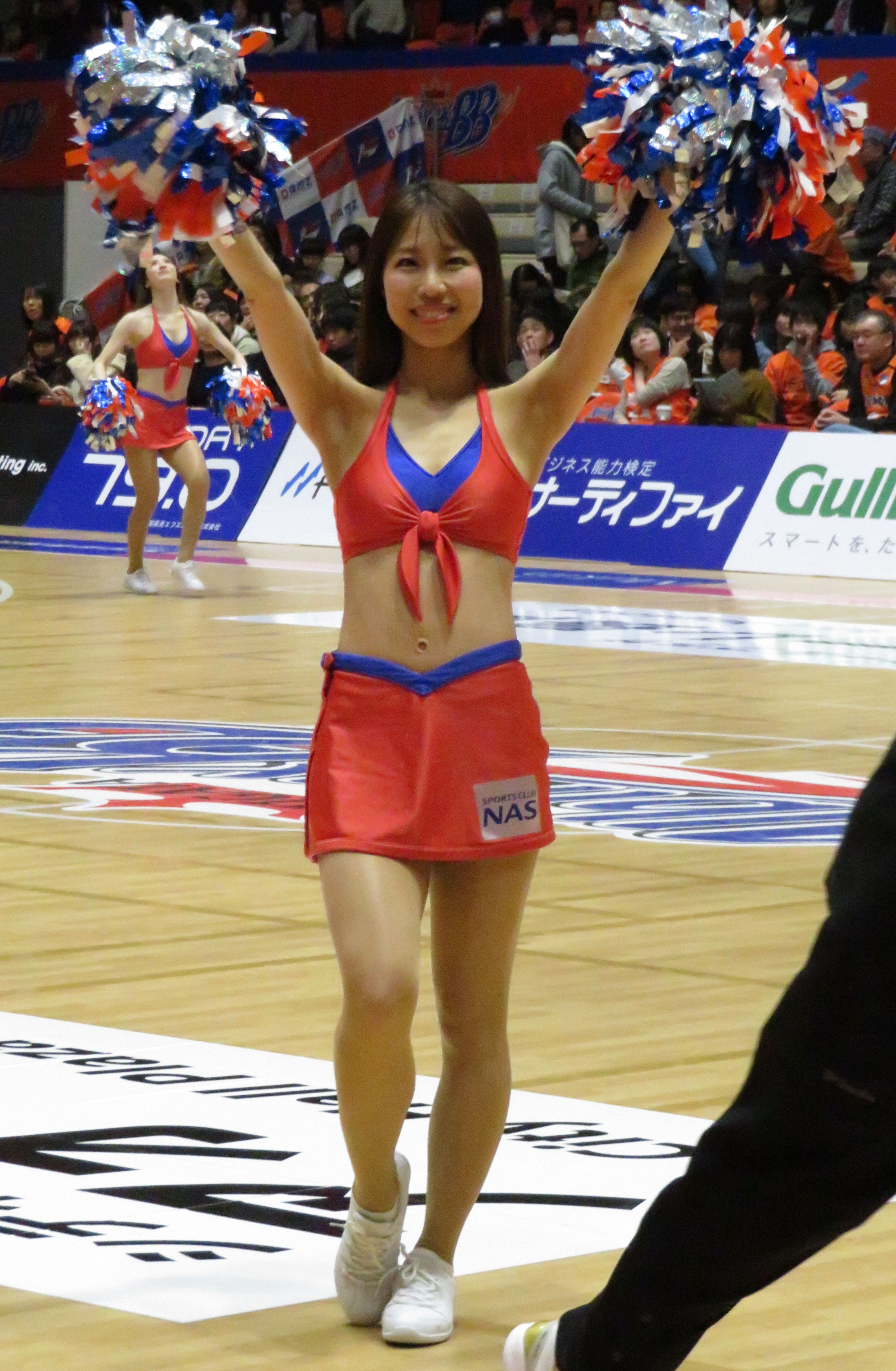 2018年12月26日 2018-19 B1 第16節 新潟-横浜 シティホールプラザアオーレ長岡